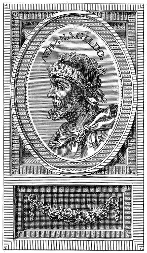 Rey visigodo de Hispania. Retrato de Atanagildo